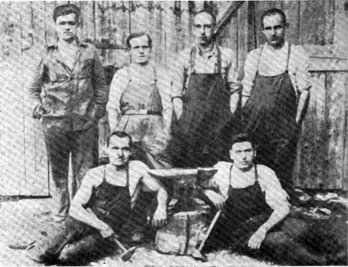 Srpskohrvatski / српскохрватски: Politički zatvorenici, komunisti, u kovačnici sremskomitrovačke kaznionice. Prvi s desna Đuro Pucar.